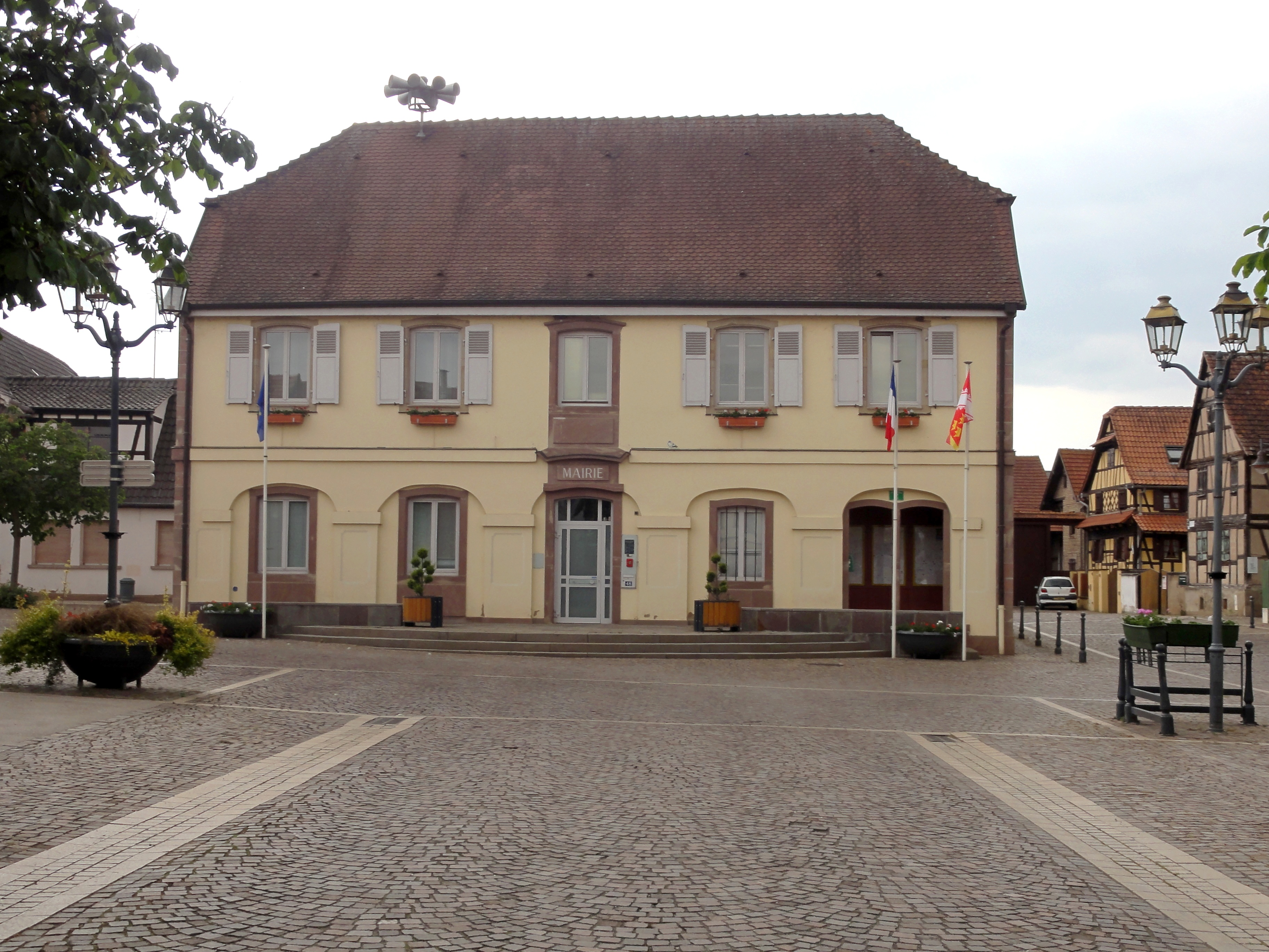 Alsace, Bas-Rhin, Duppigheim, Mairie (1862), place de la Mairie. .